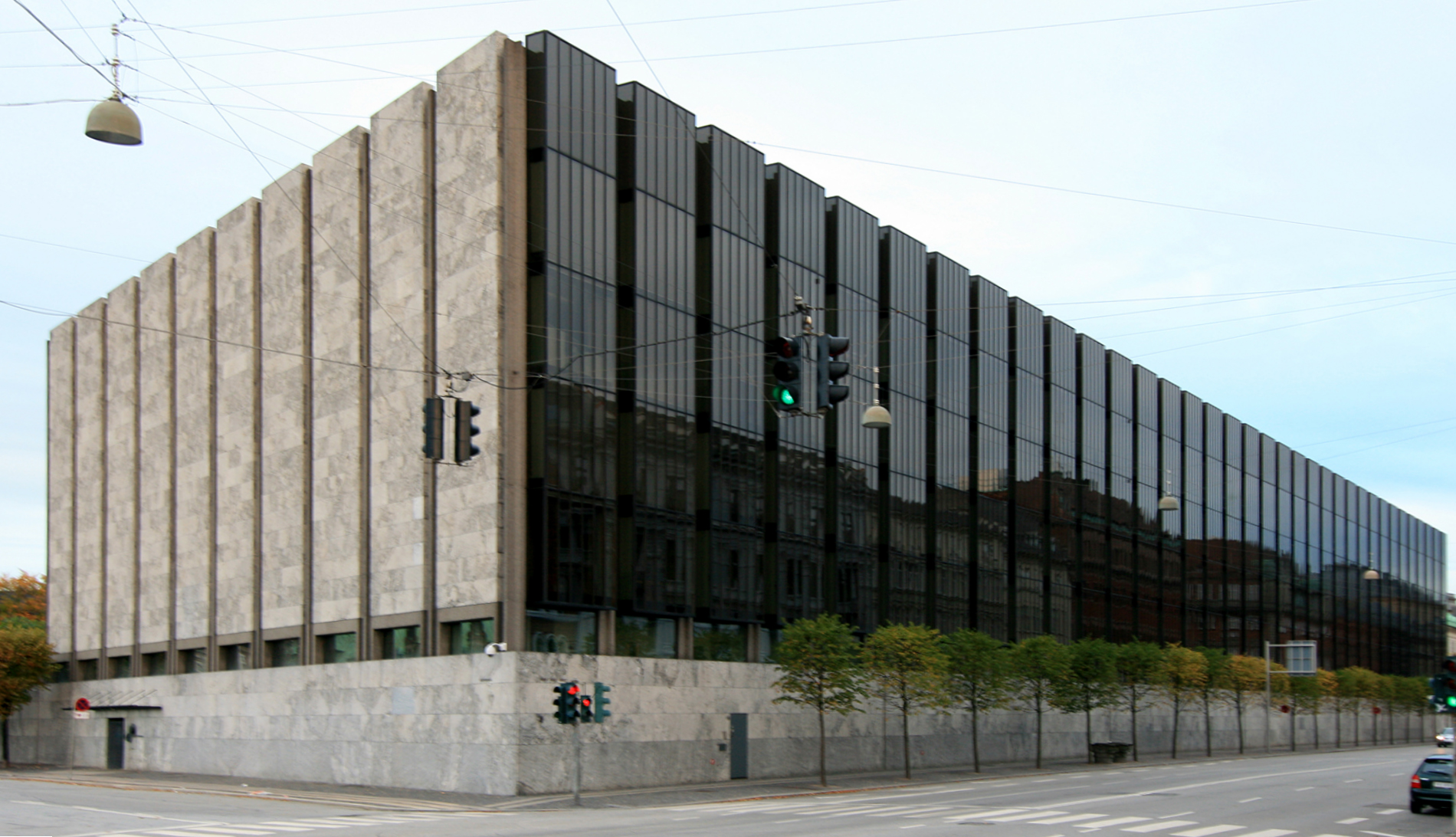 Danmarks Nationalbank, Havnegade 5, København. Bygget 1965-1971. Arkitekter: Arne Jacobsen, Dissing + Weitling A/S.